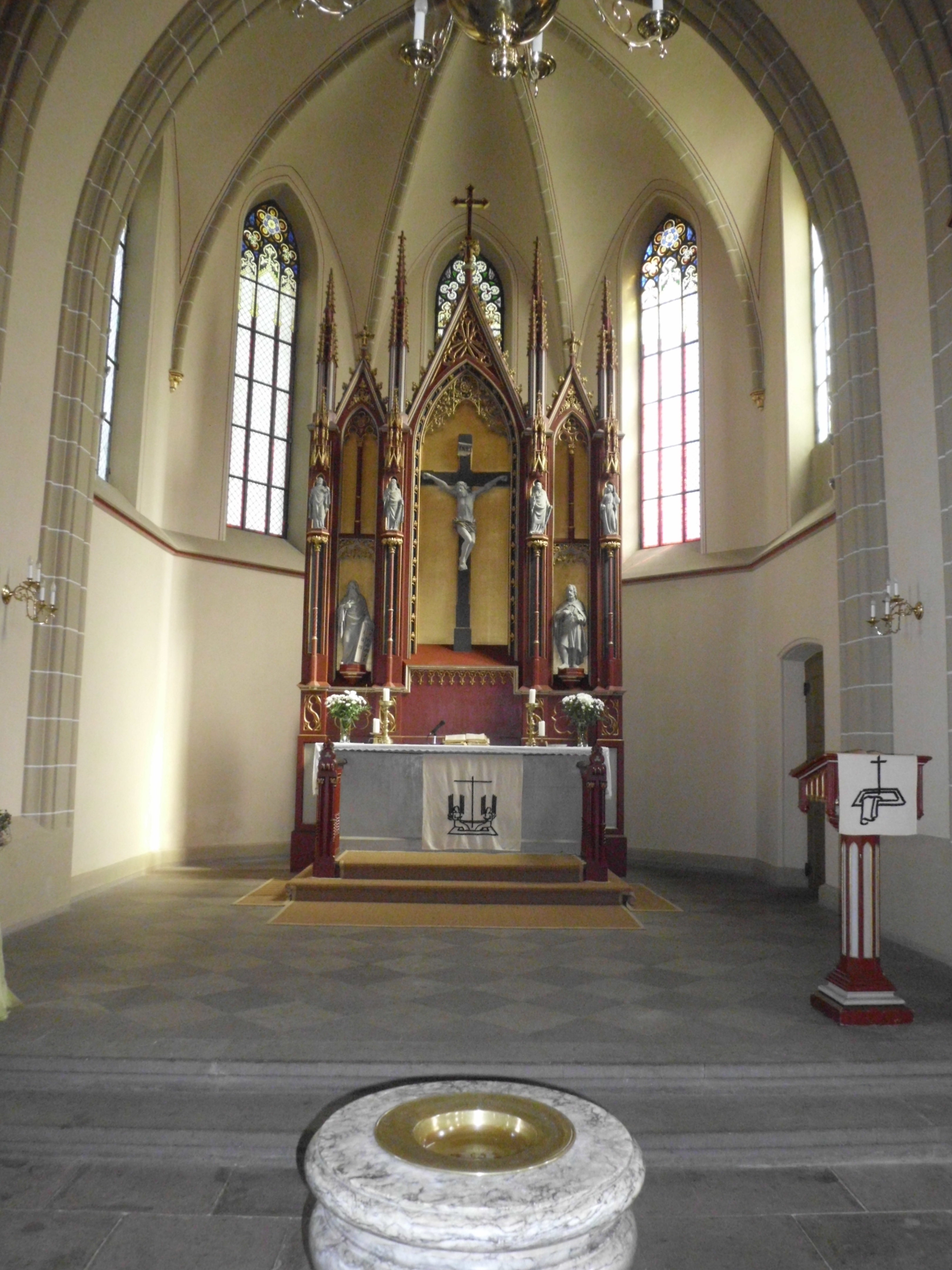 mit Taufbecken und Altar